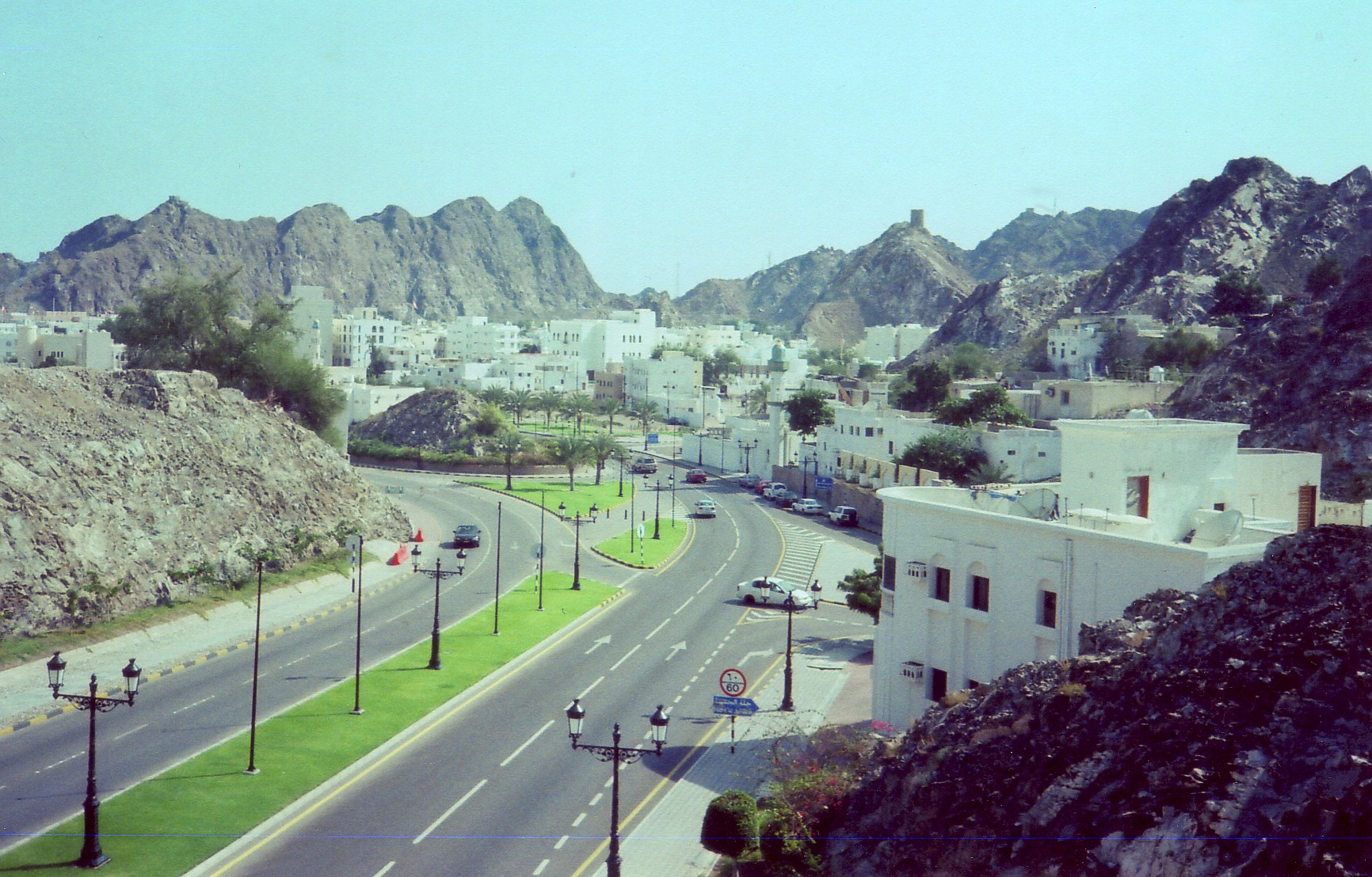 Mascate